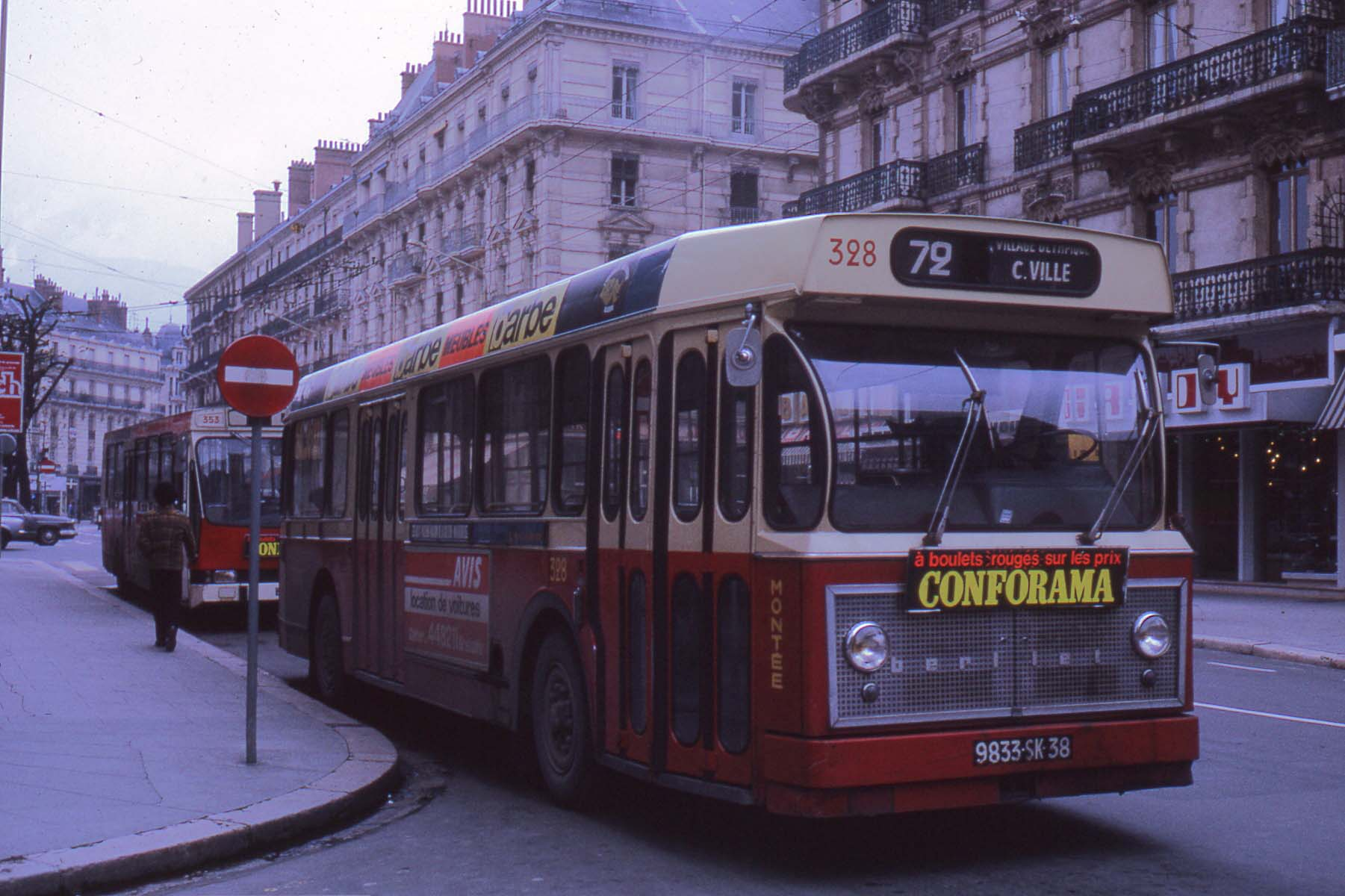 un Berliet PCM-U s'engageant dans la Rue Felix Poulat en 1975